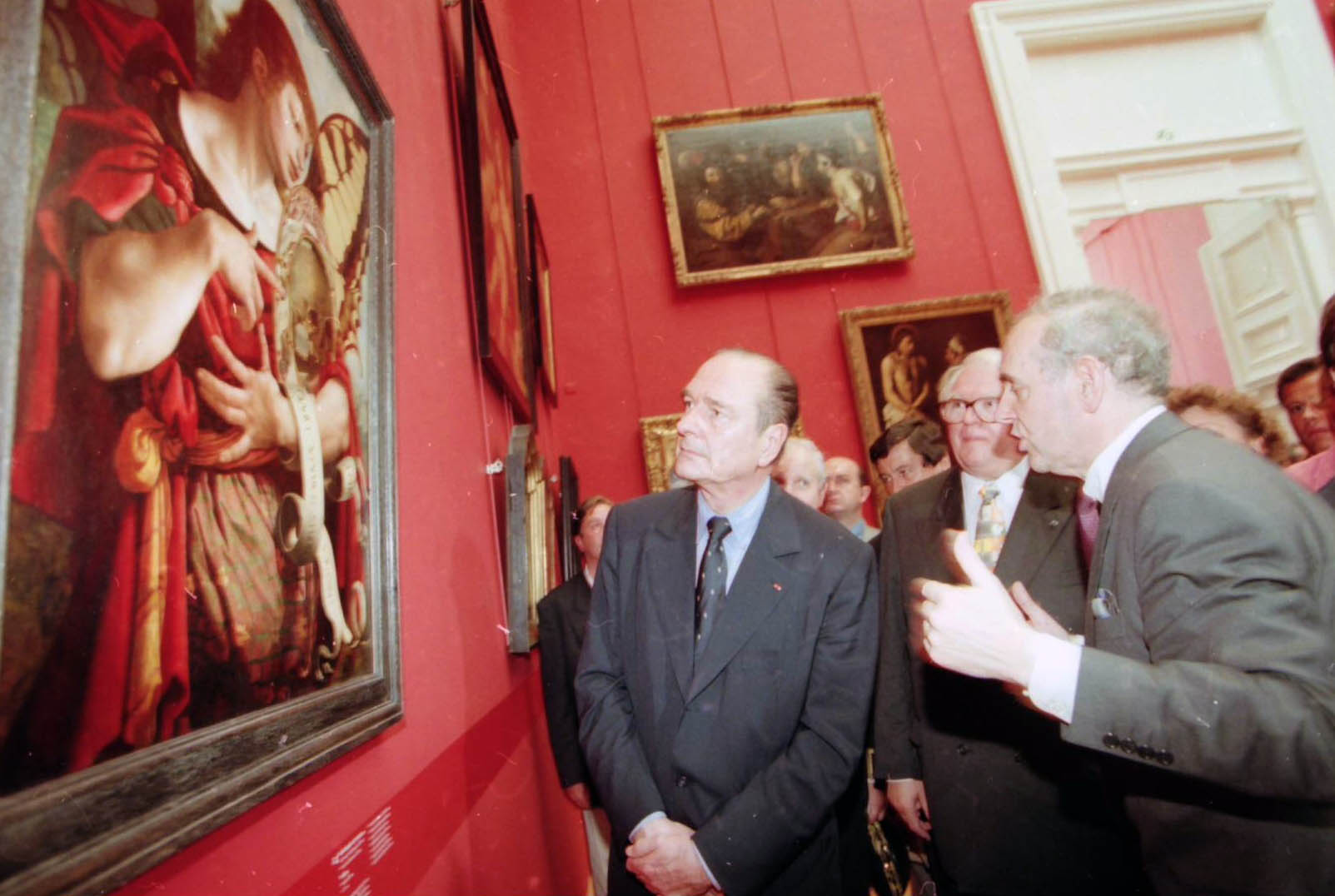 Chirac Beaux Arts 07 06 97 (Photo VDN)